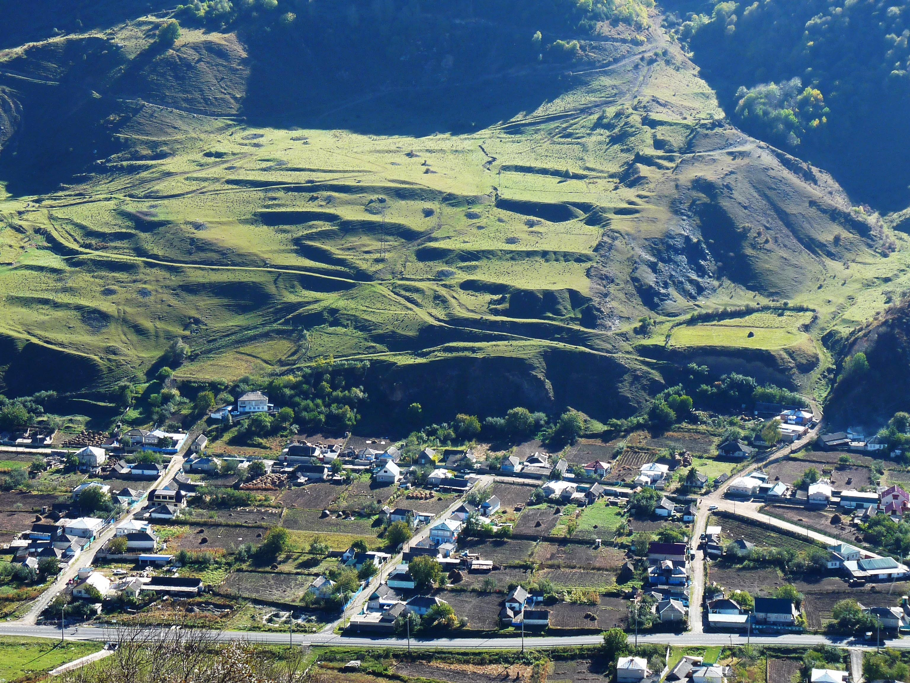 Теберда, Карачаевск This image is related to the protected area of Russia number 0900023